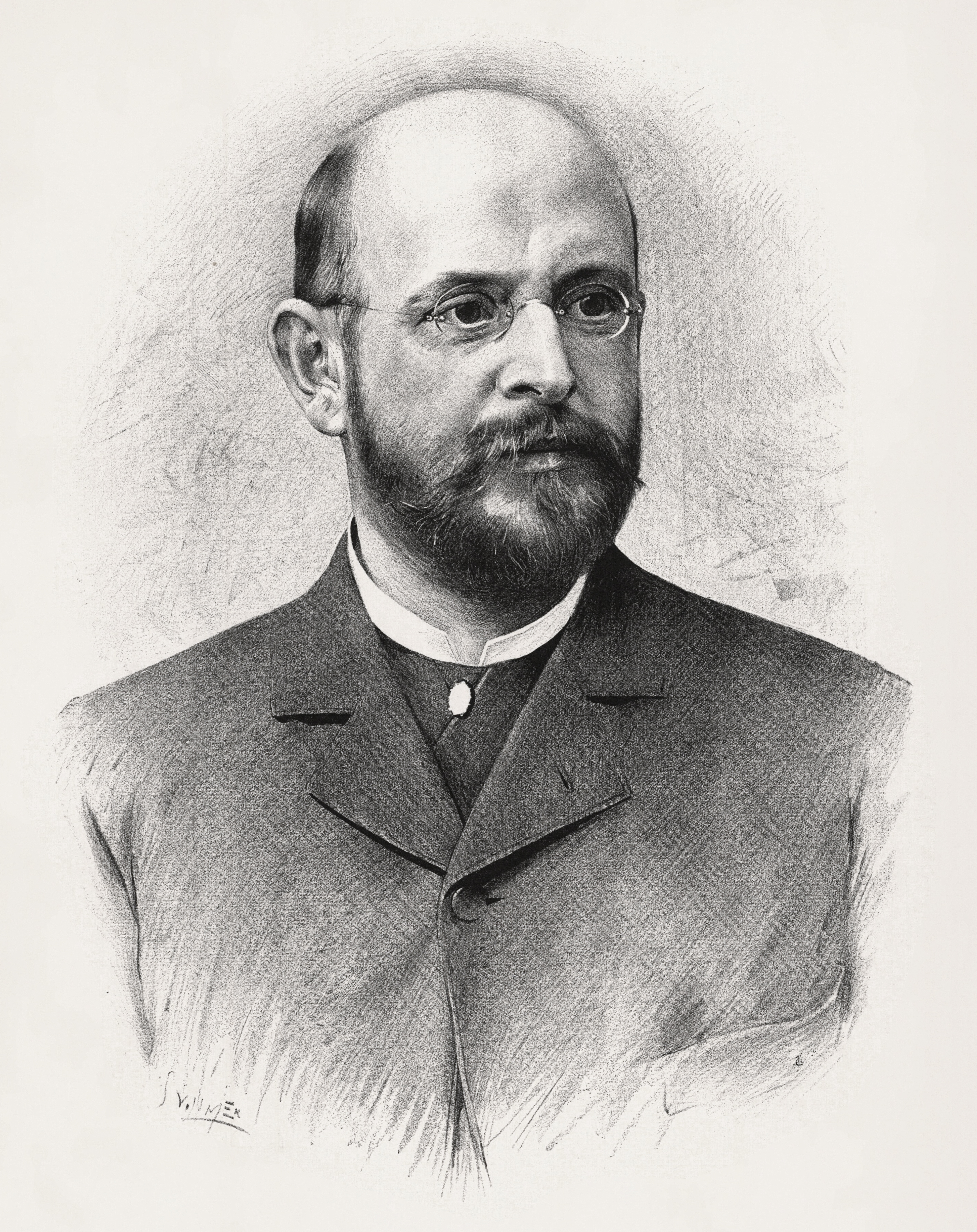 Alois Jirásek (1851-1930), český spisovatel.